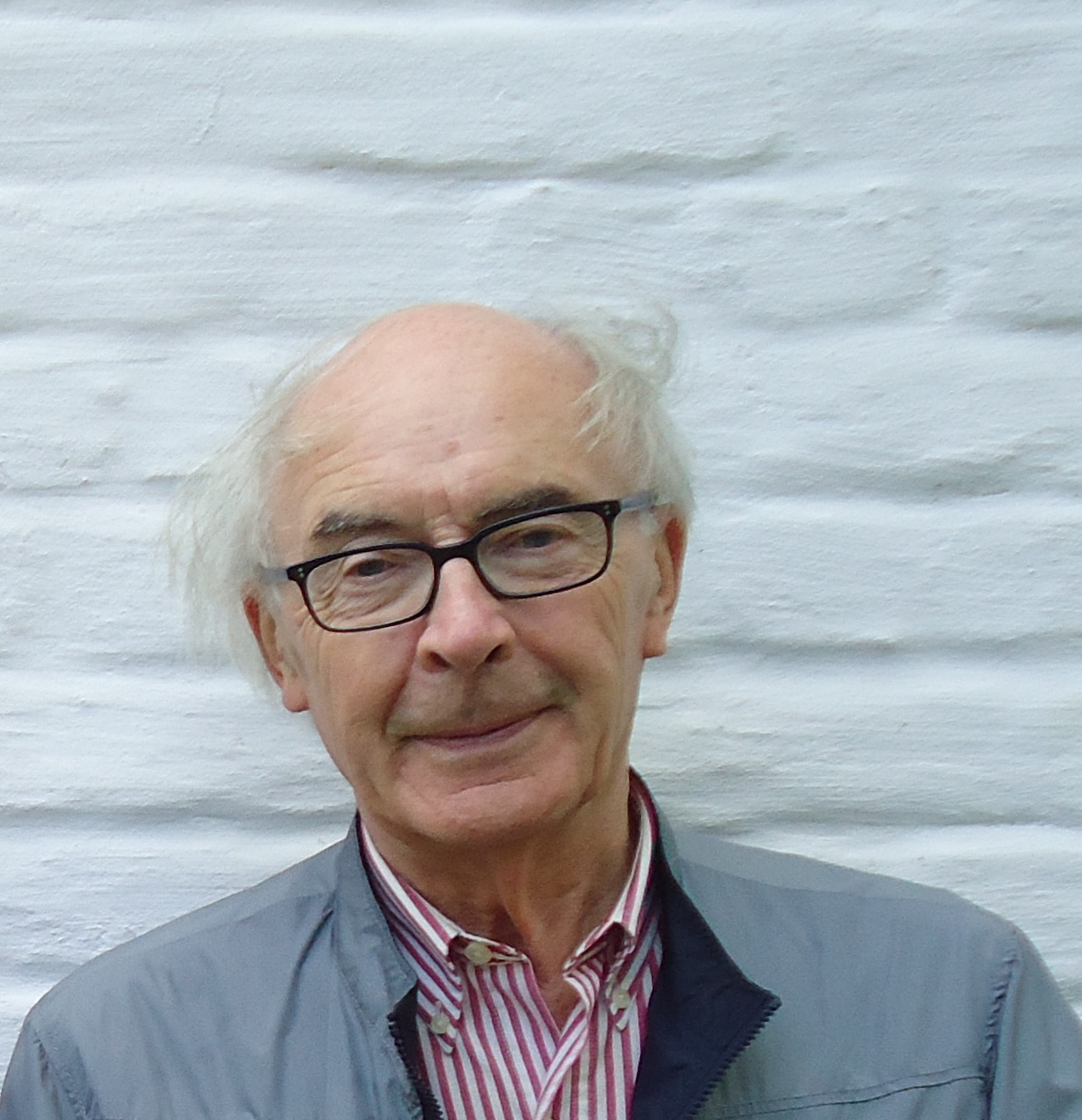 Portret van Ludo Simons